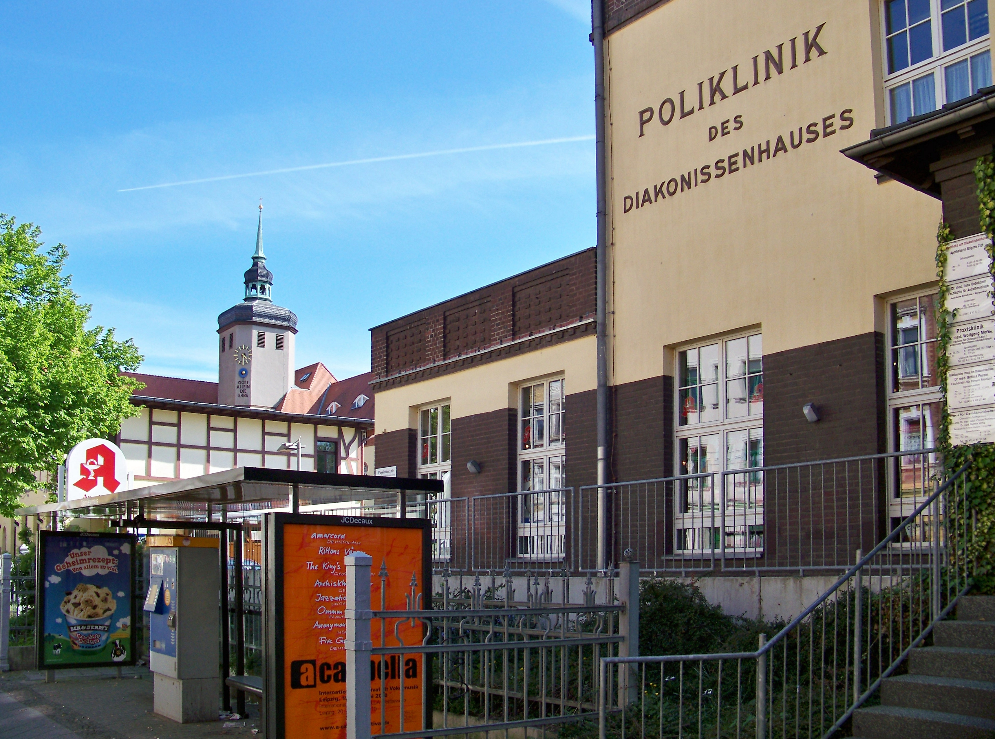 Poliklinik des Evangelischen Diakonissenkrankenhauses - Akademisches Lehrkrankenhaus der Universität Leipzig - in der Georg-Schwarz-Straße in Leipzig-Leutzsch, davor die Haltestelle Diakonissenhaus